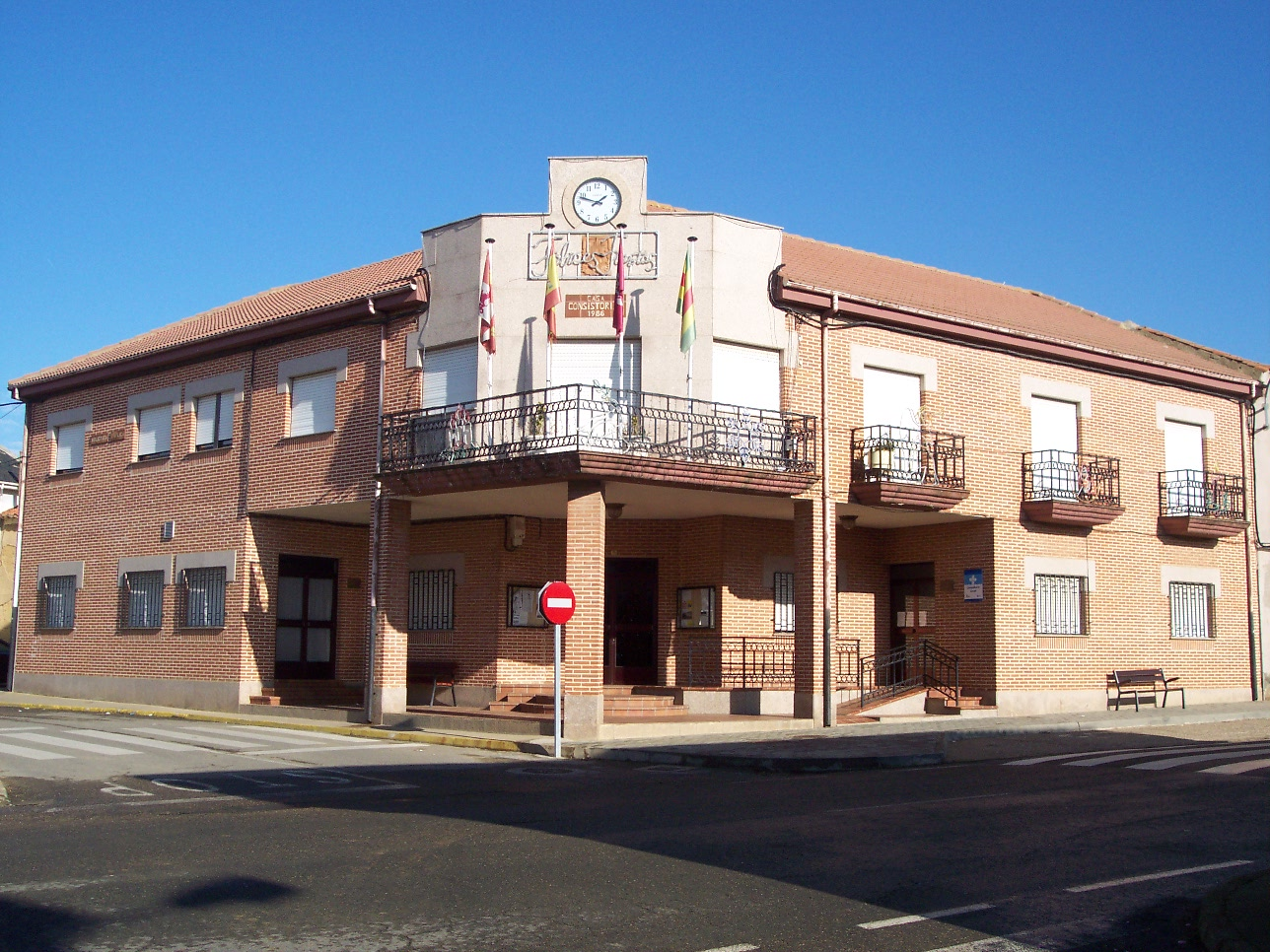 Vista del Ayuntamiento de San Justo de la Vega